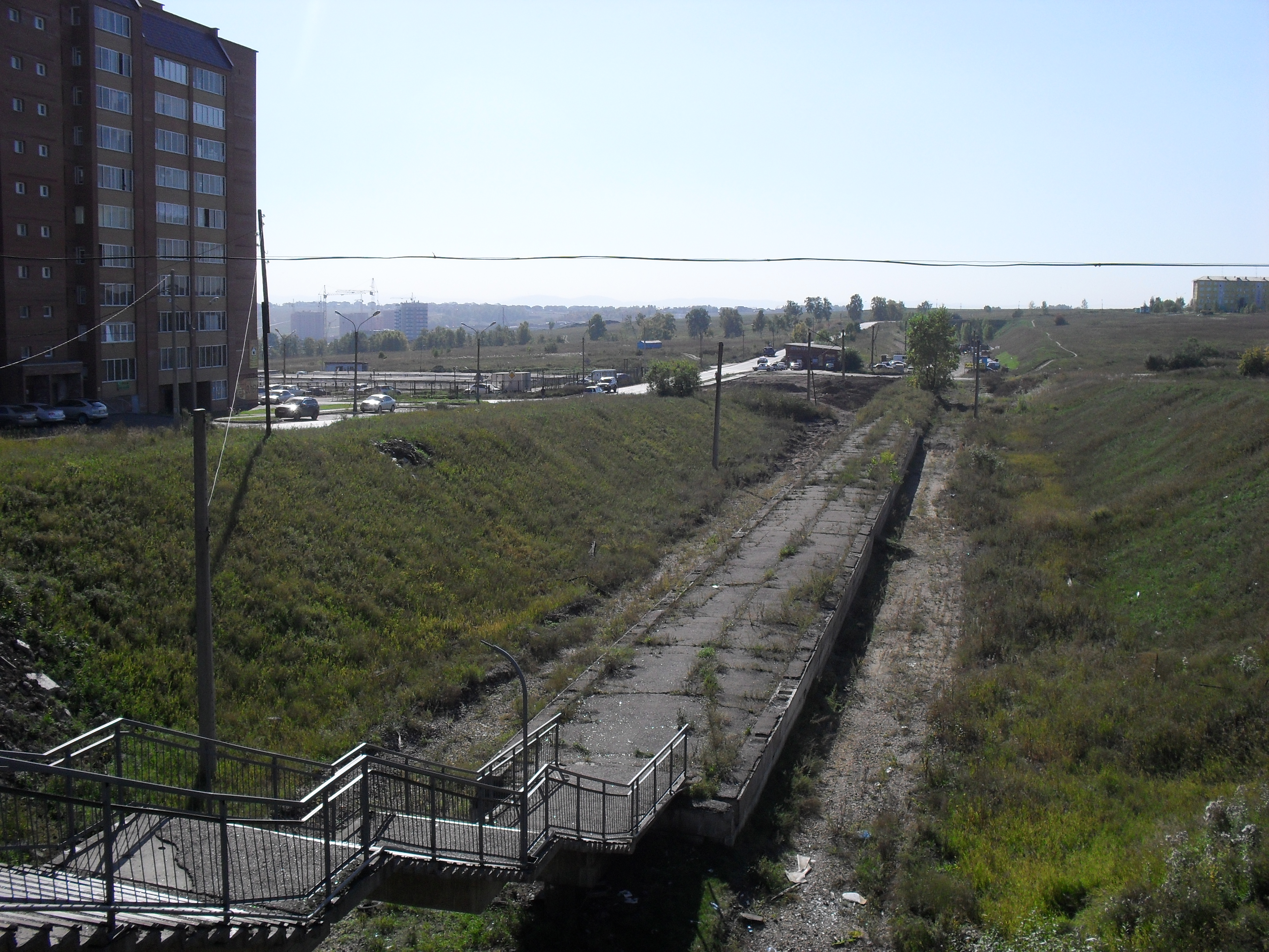 Бывшая железнодорожная станция в мкрн Солнечный, Красноярск